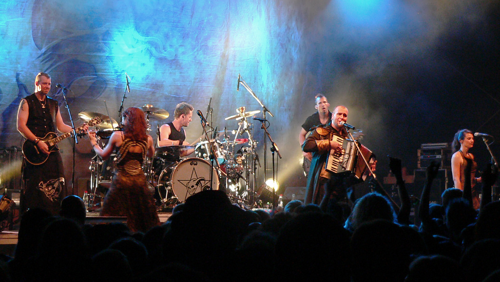 Schandmaul